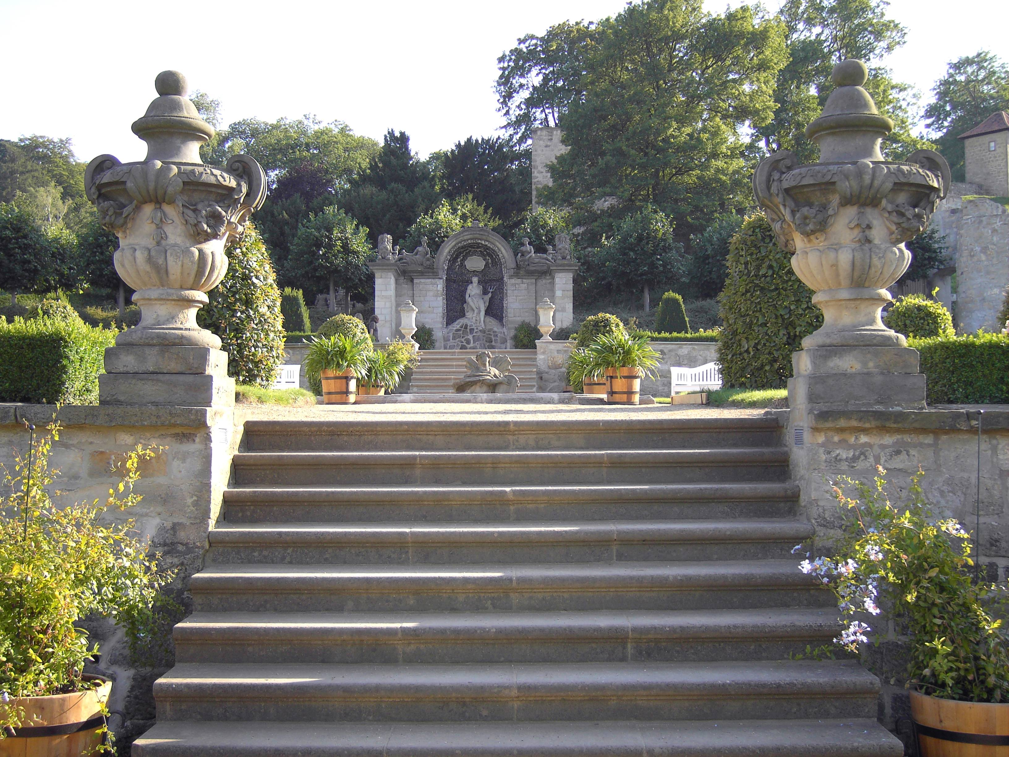 Blankenburg (Harz). Barocker Terrassengarten am Kleinen Schloss